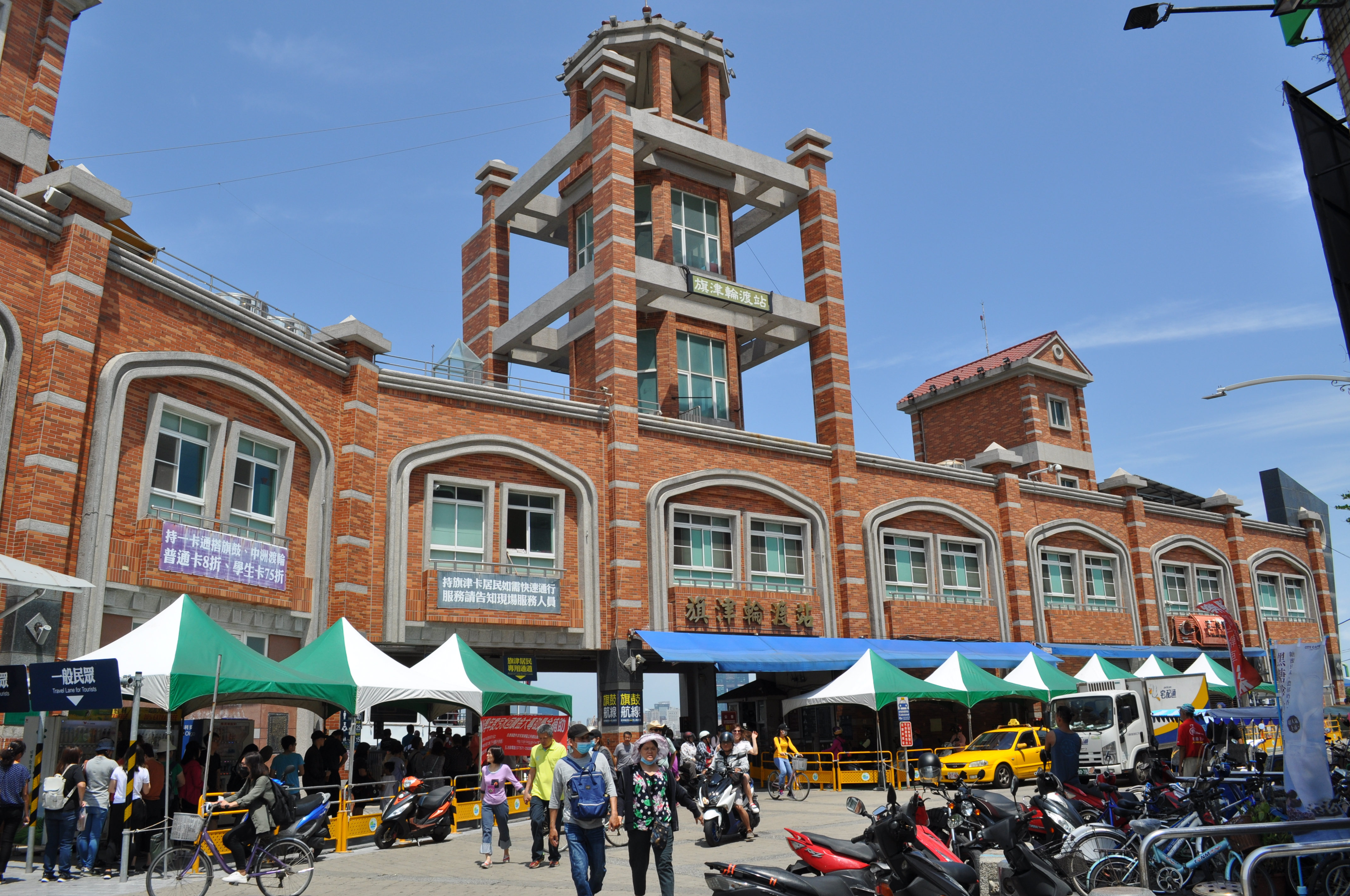 中文（台灣）: 旗津輪渡站建築外觀